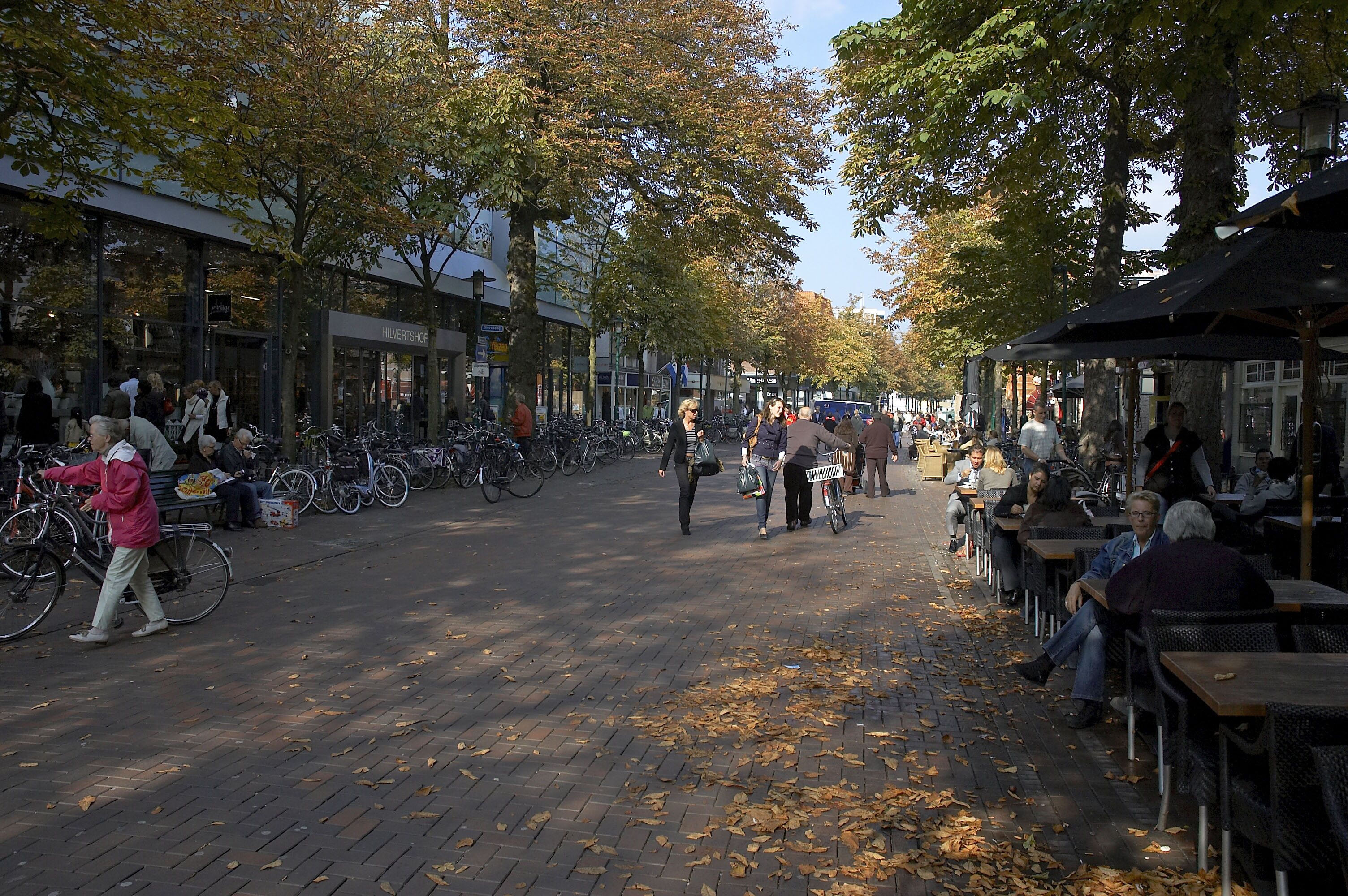 Links ingang winkelcentrum Hilvertshof aan de Groest, Hilversum